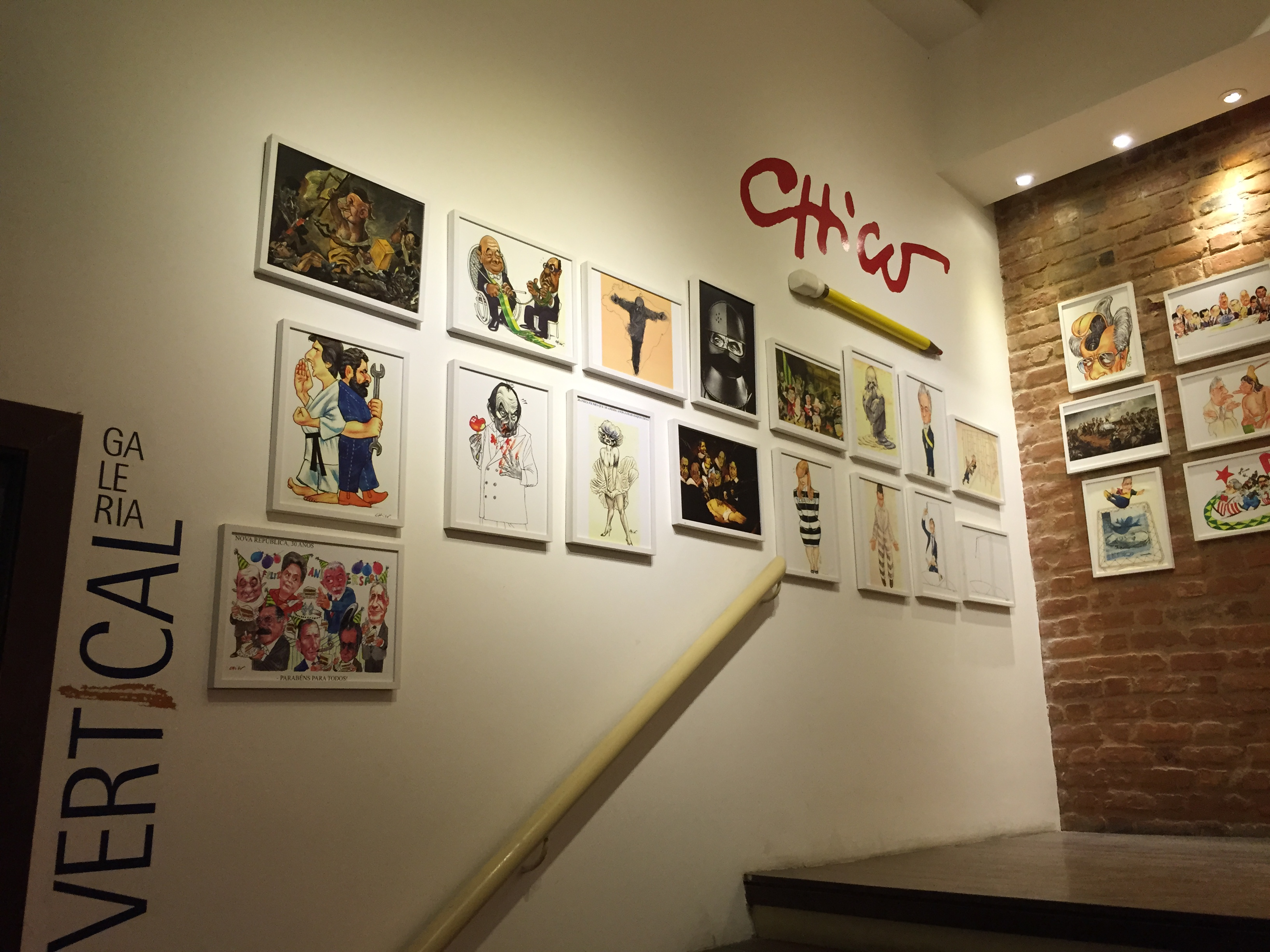 Foto da galeria em Solar de Botafogo